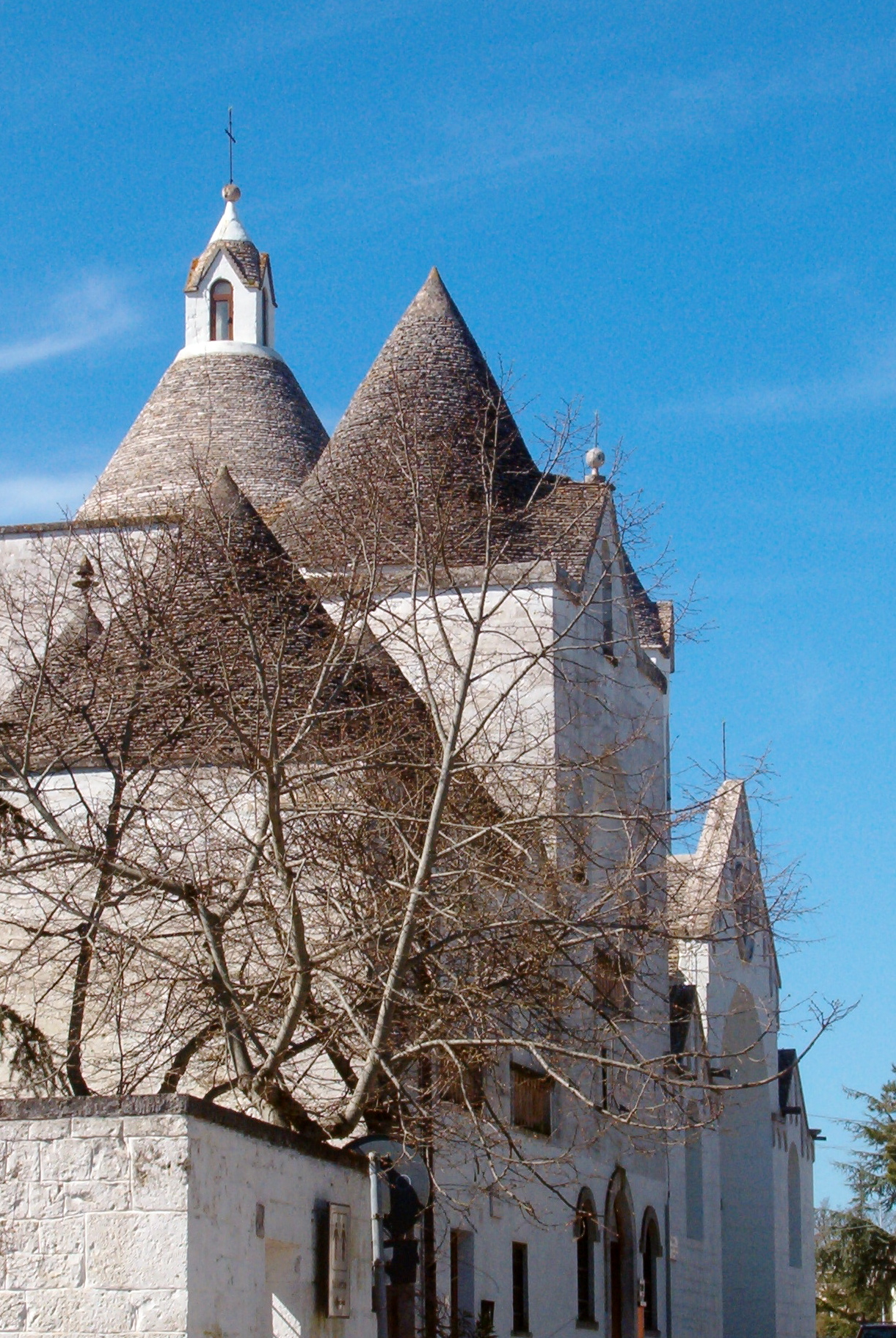 Chiesa di Sant'Antonio ("a trullo") ad Alberobello, Italy